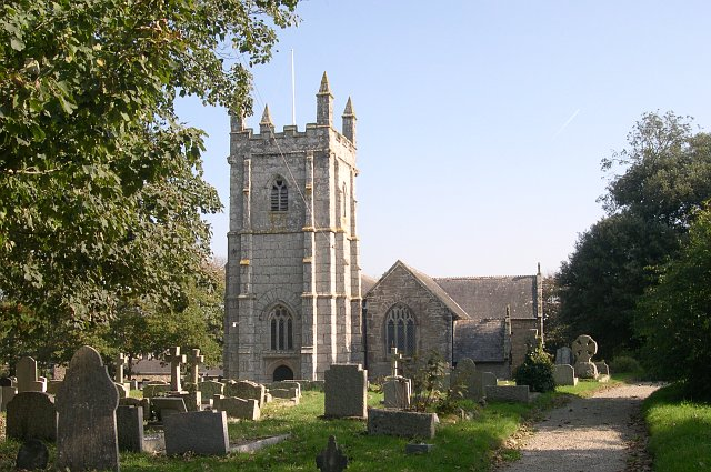 Perranzabuloe Church